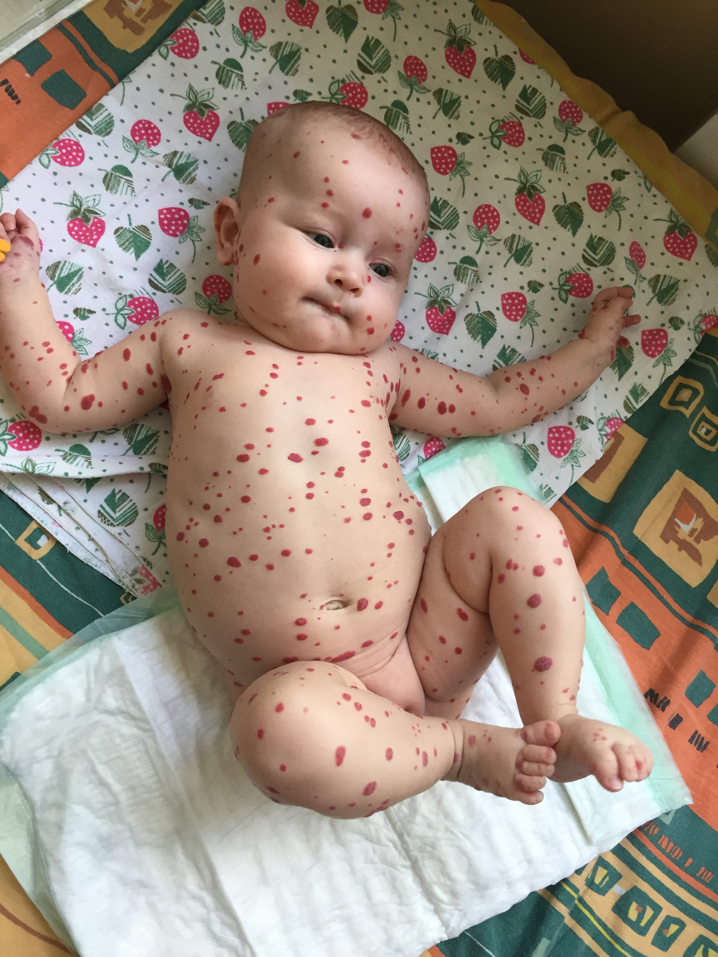 Гемангиоматоз